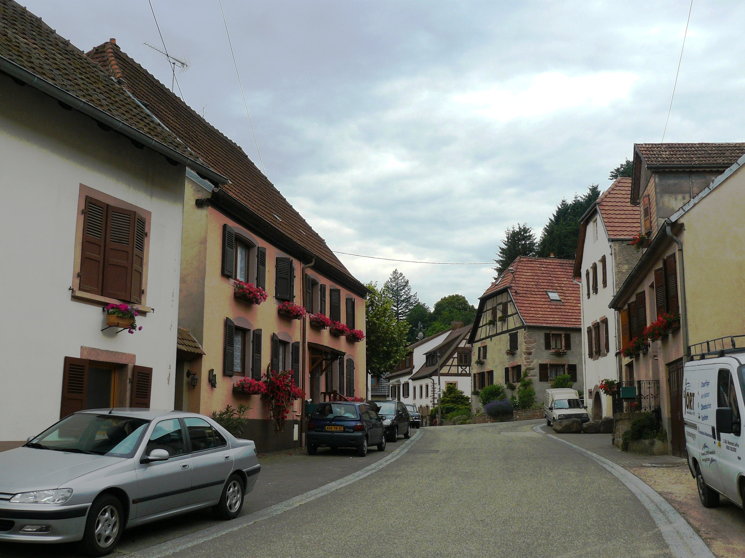 Un groupe de maisons sur l'artère principale de Bassemberg